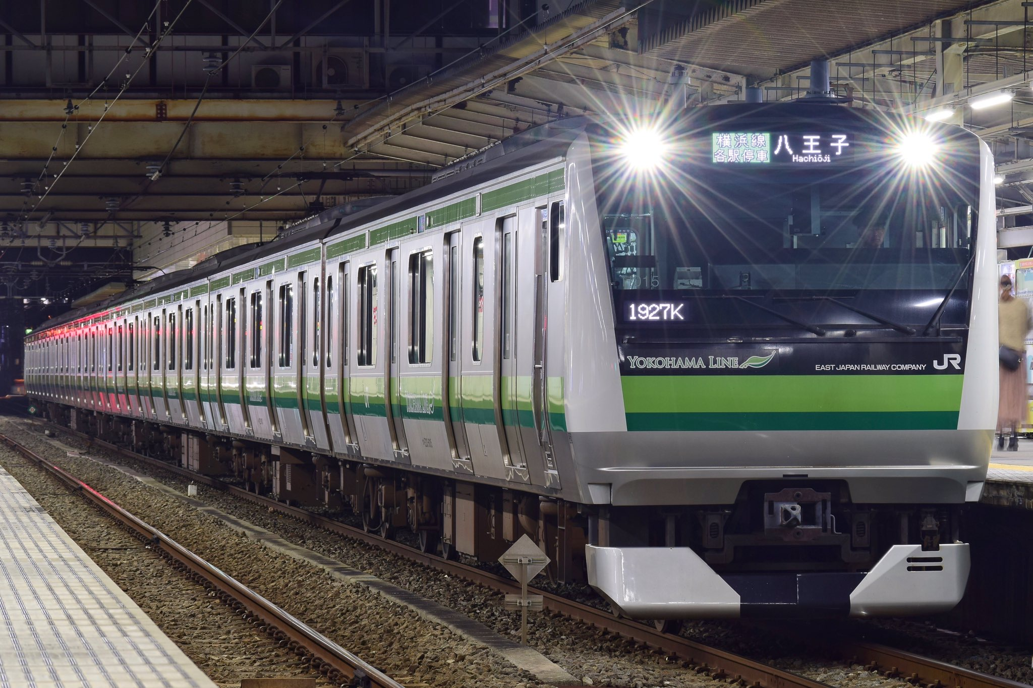 JR横浜線中山駅 1927K 各駅停車八王子